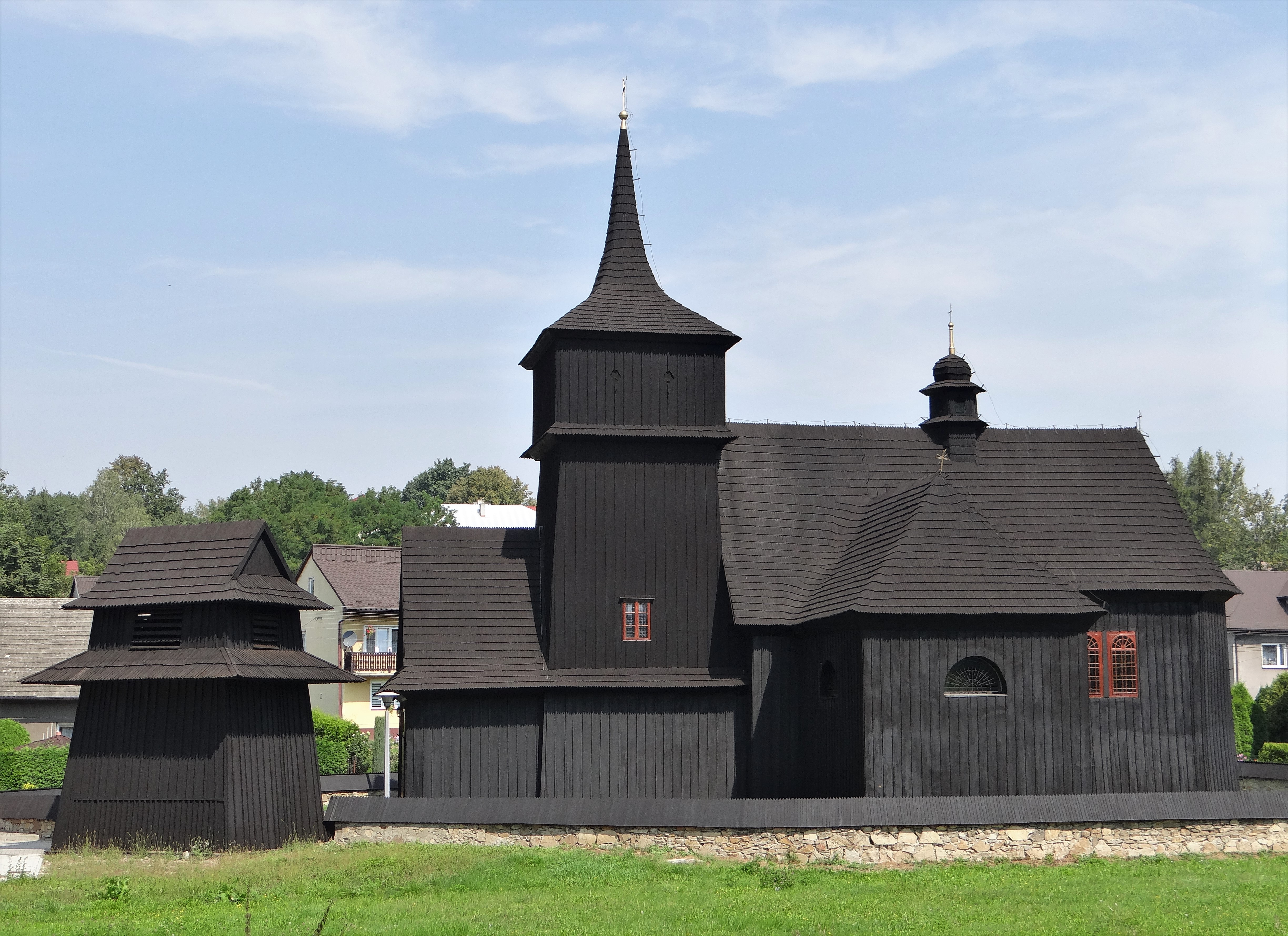 Woźniki, Kościół Wniebowzięcia Najświętszej Maryi Panny w Woźnikach